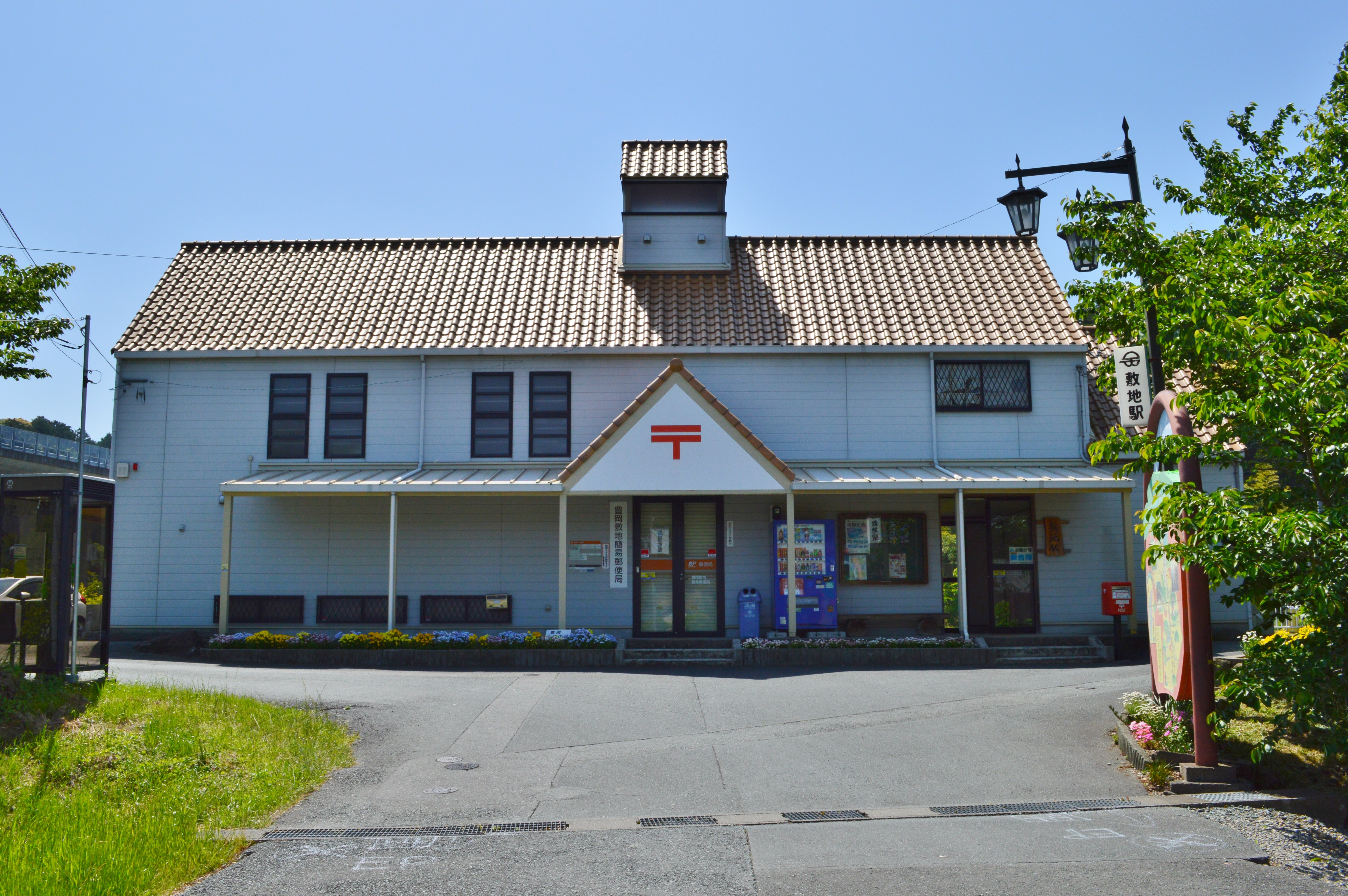 敷地駅 駅舎